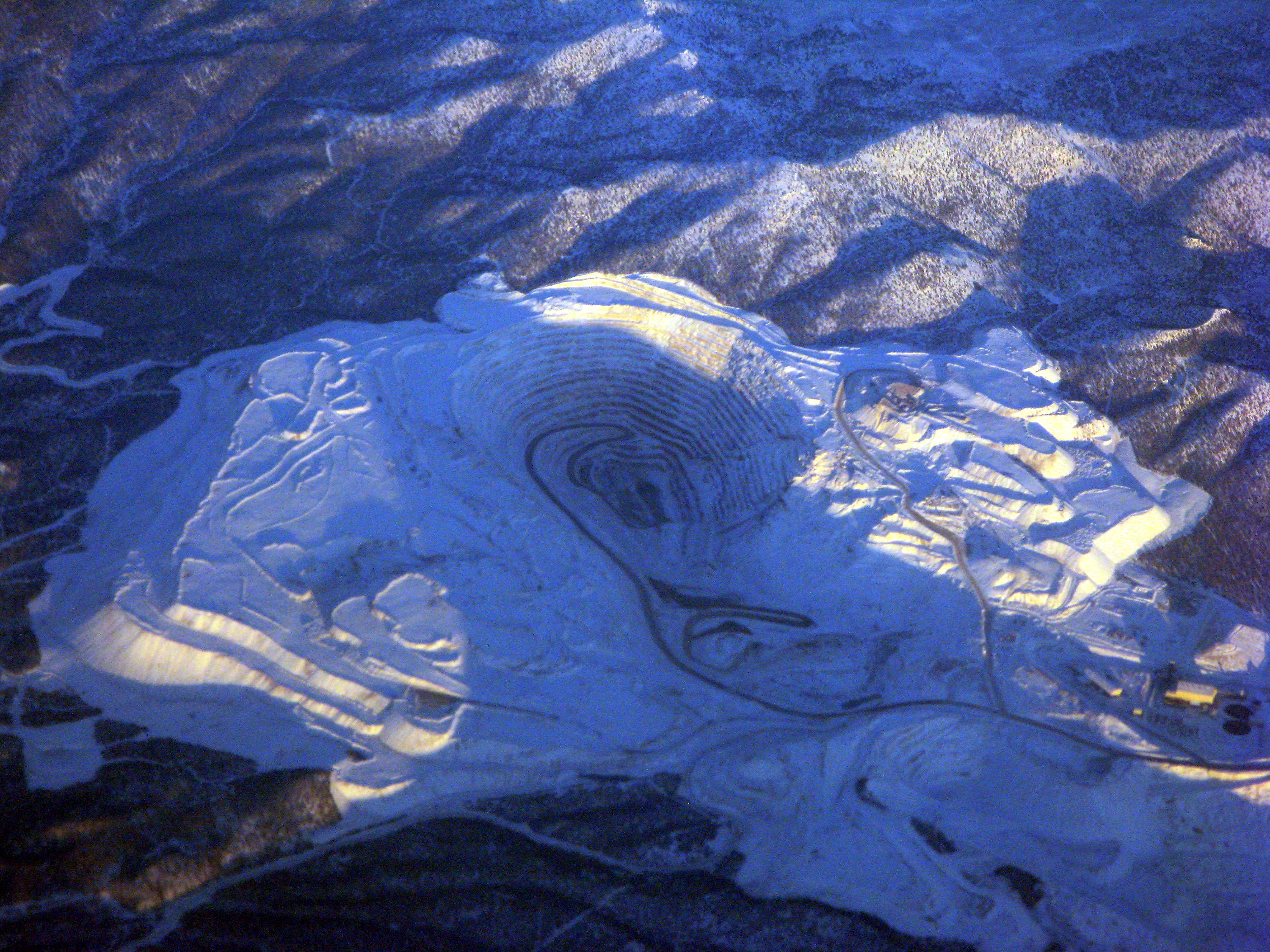 Robinson copper mine outside Ely, Nevada